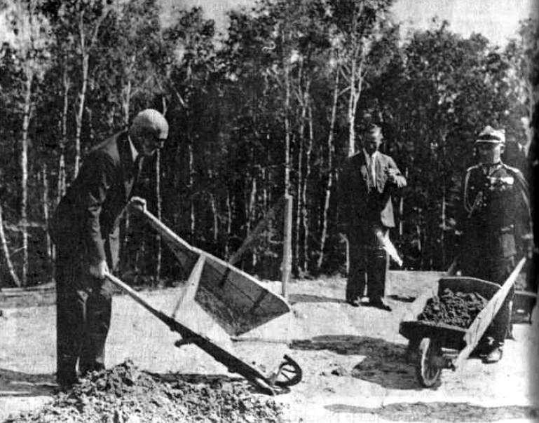 E. Rydz-Śmigły, Walery Sławek, Józef Beck i inni członkowie rządu przy sypaniu kopca J. Piłsudskiego na Sowińcu w Krakowie (czerwiec 1936 r.).